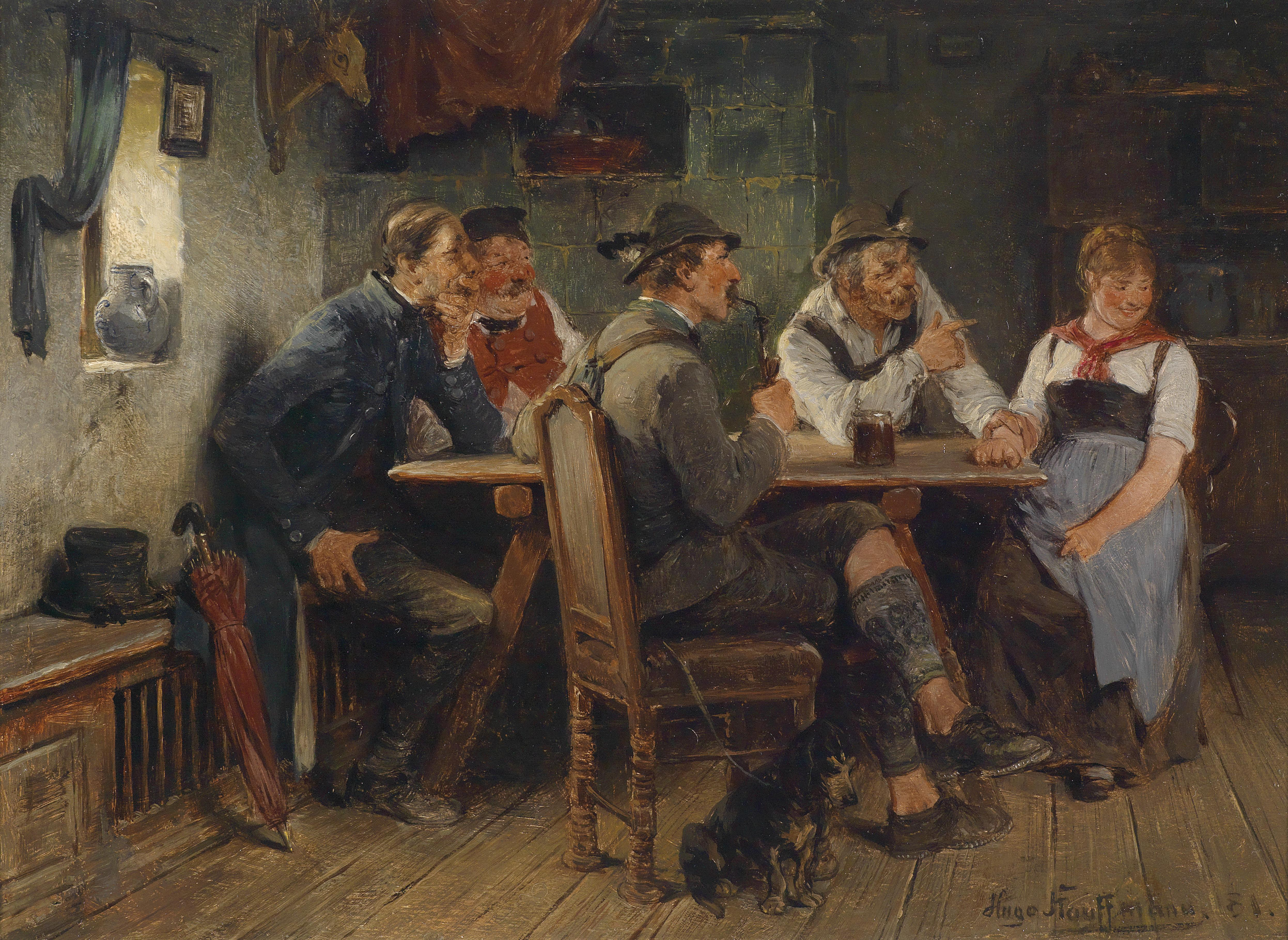 "Auf dem Prüfstand" signiert und datiert Hugo Kauffmann, (18)81, Öl auf Holz, 18,5 x 25 cm